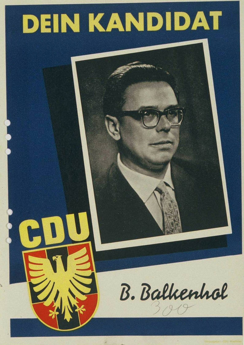 Dein Kandidat Abbildung: Porträtfoto Plakatart: Kandidaten-/Personenplakat mit Porträt Auftraggeber: CDU Westfalen Objekt-Signatur: 10-001: 735 Bestand: Plakate zu Bundestagswahlen (10-001) GliederungBestand10-18: Plakate zu Bundestagswahlen (10-001) » Die 3. Bundestagswahl am 15. September 1957 » CDU » Mit Porträtfoto Lizenz: KAS/ACDP 10-001: 735 CC-BY-SA 3.0 DE